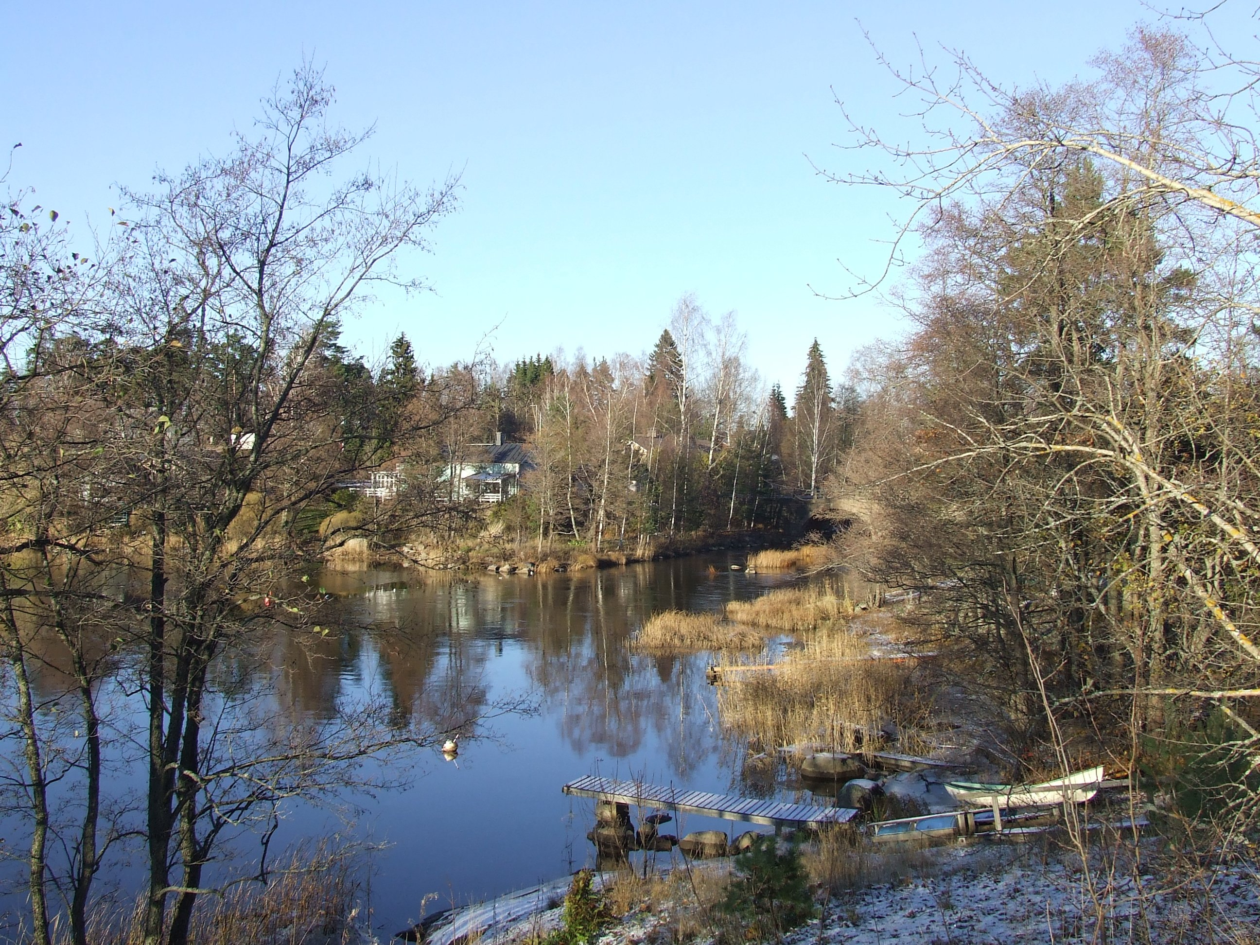 Salmenvirta Haminassa